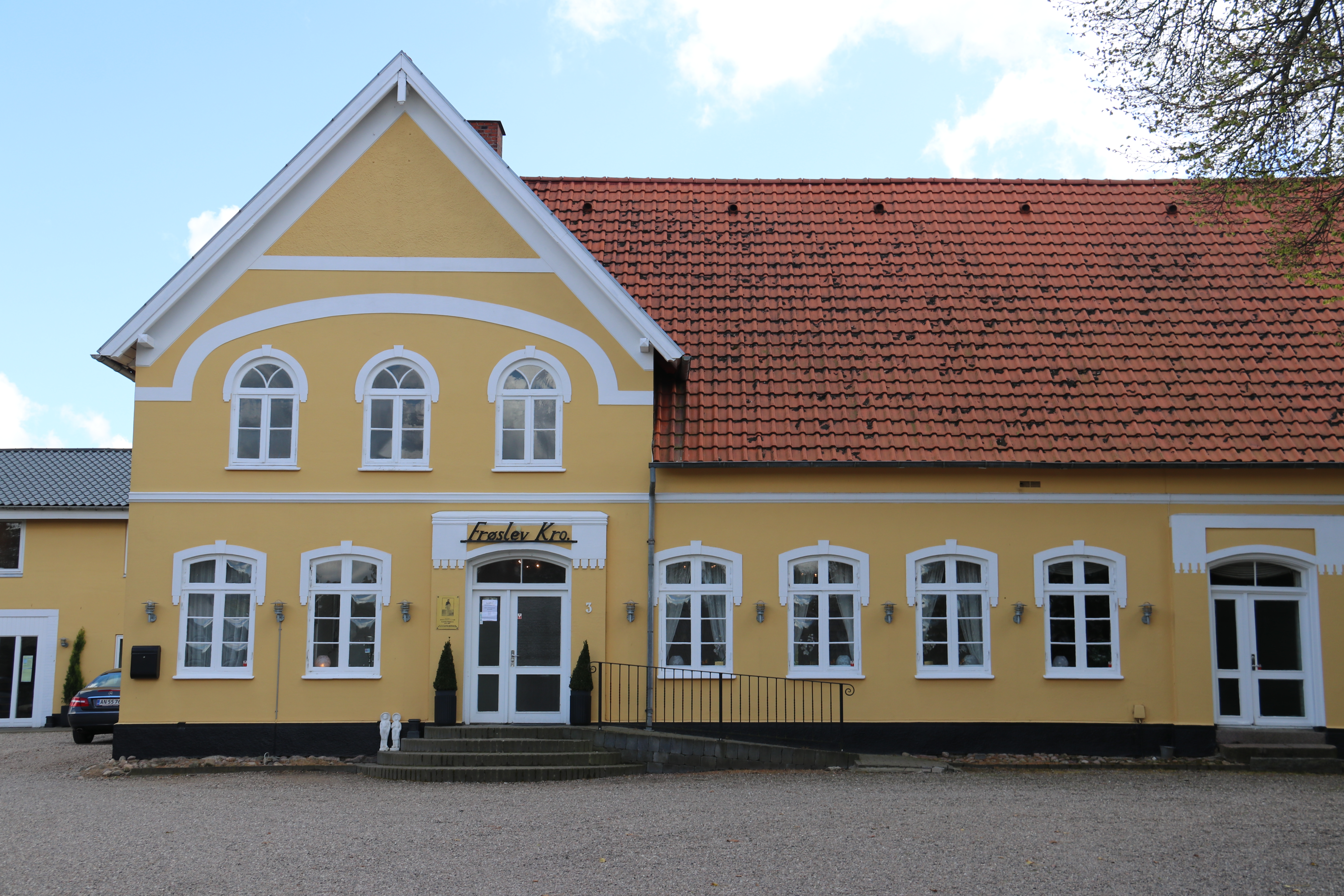 Frøslev Kro, eine Gastwirtschaft in Frøslev (Aabenraa Kommune)